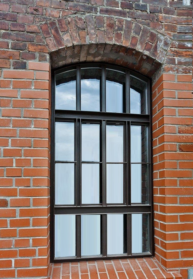 Otwór okienny w murze ceglanym zwieńczony łukiem odcinkowym (nadprożem).